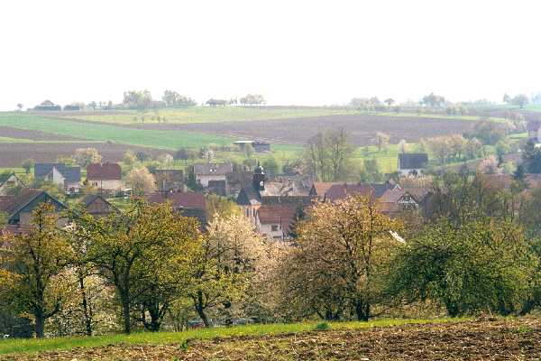 Vue générale de Knoeringue.